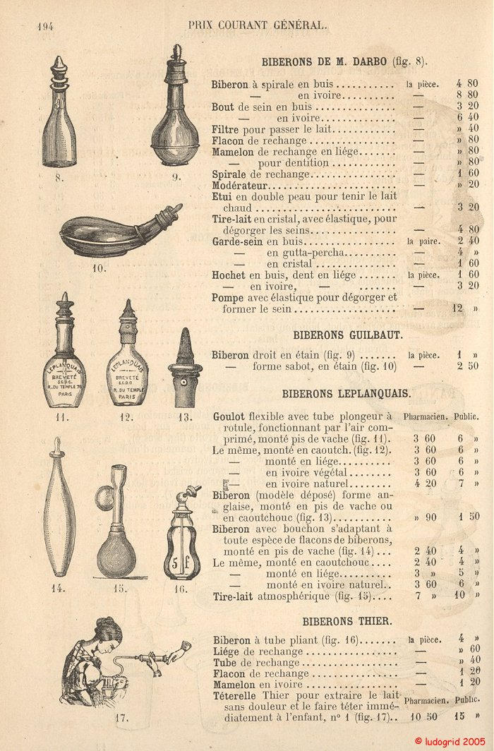 Catalogue pharmaceutique Dorvault 1862 - Page 194 Source : Ludogrid 2006 - Petite Histoire du Biberon